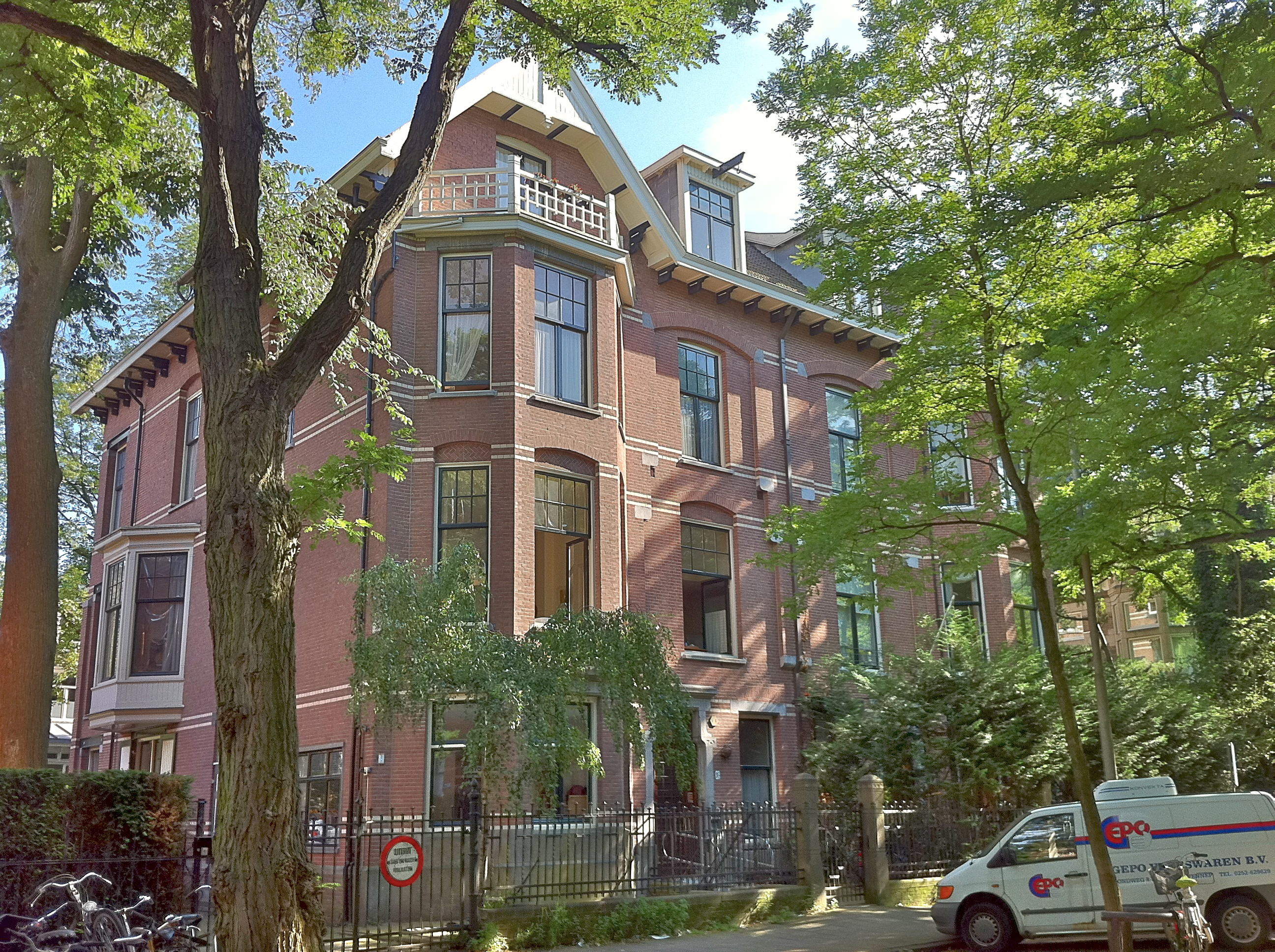 Befaamd voormalig kraakpand Lucky Luyk aan de Jan Luijkenstraat 3 Amsterdam